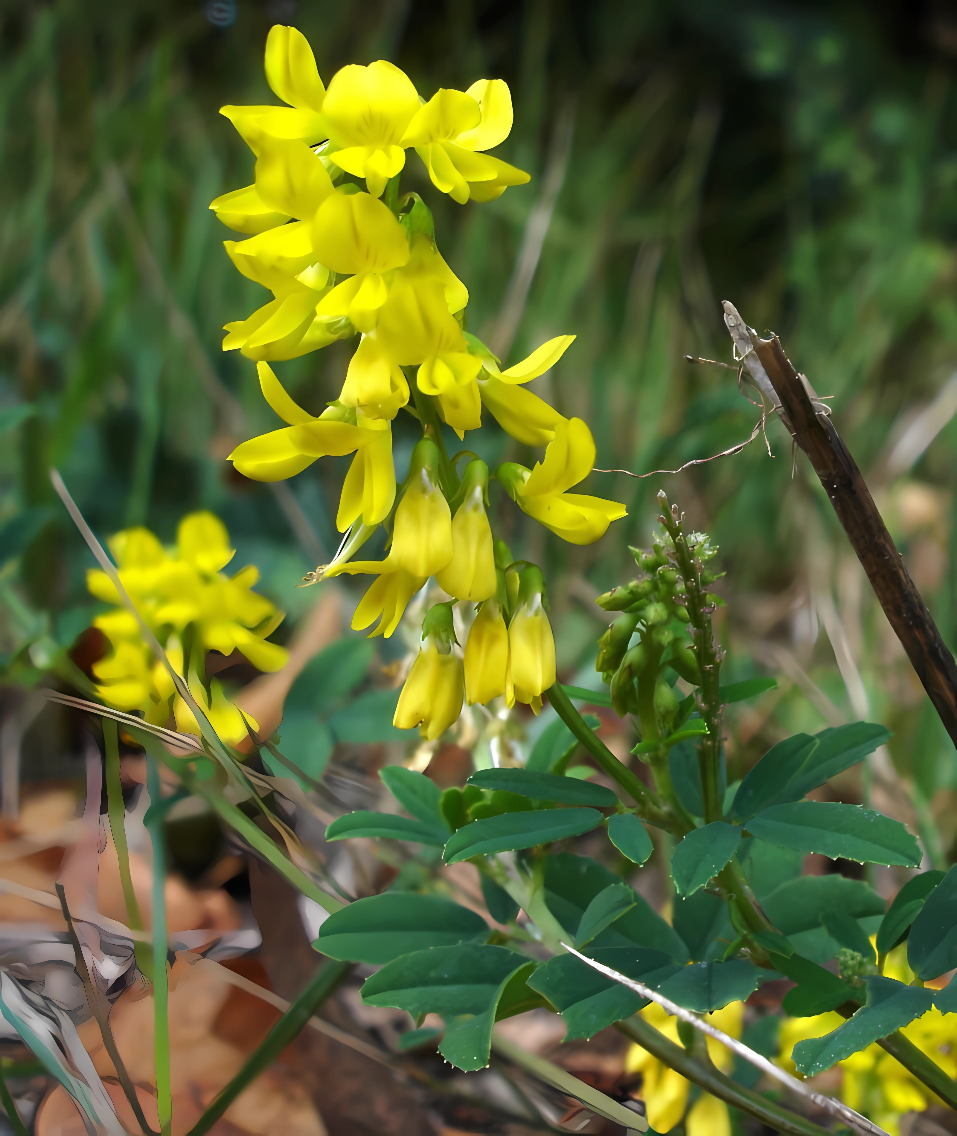 Melilotus altissima, Moret sur Loing